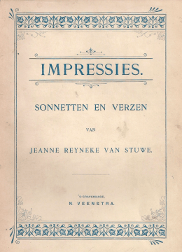 Titelpagina van de dichtbundel met de eerste sonnettenkrans in het Nederlands